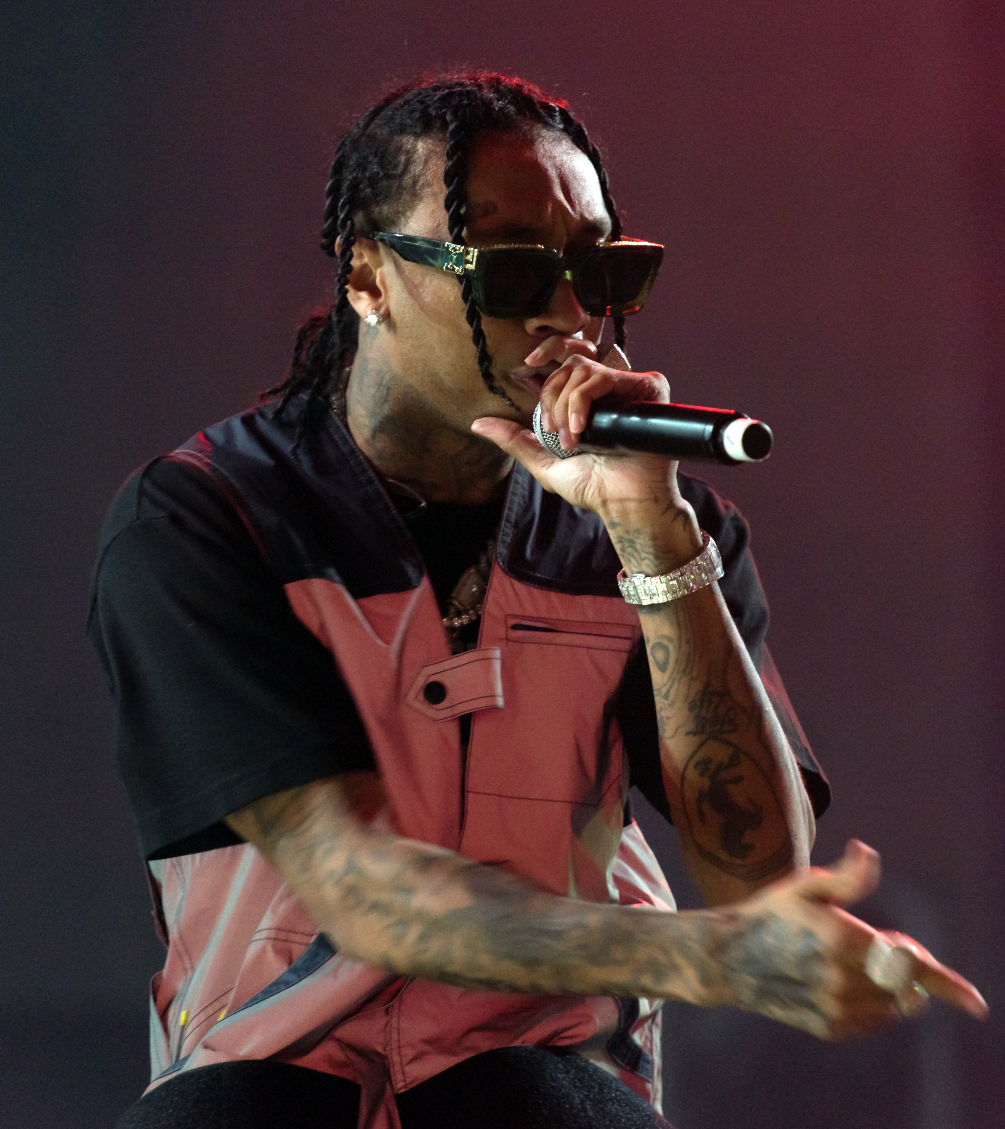 Tyga live auf dem Openair Frauenfeld 2019